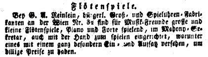 Anzeige in der Wiener Zeitung von 23.11.1816 legt Zeugnis über die Existenz der Fa. Reinlein ab.